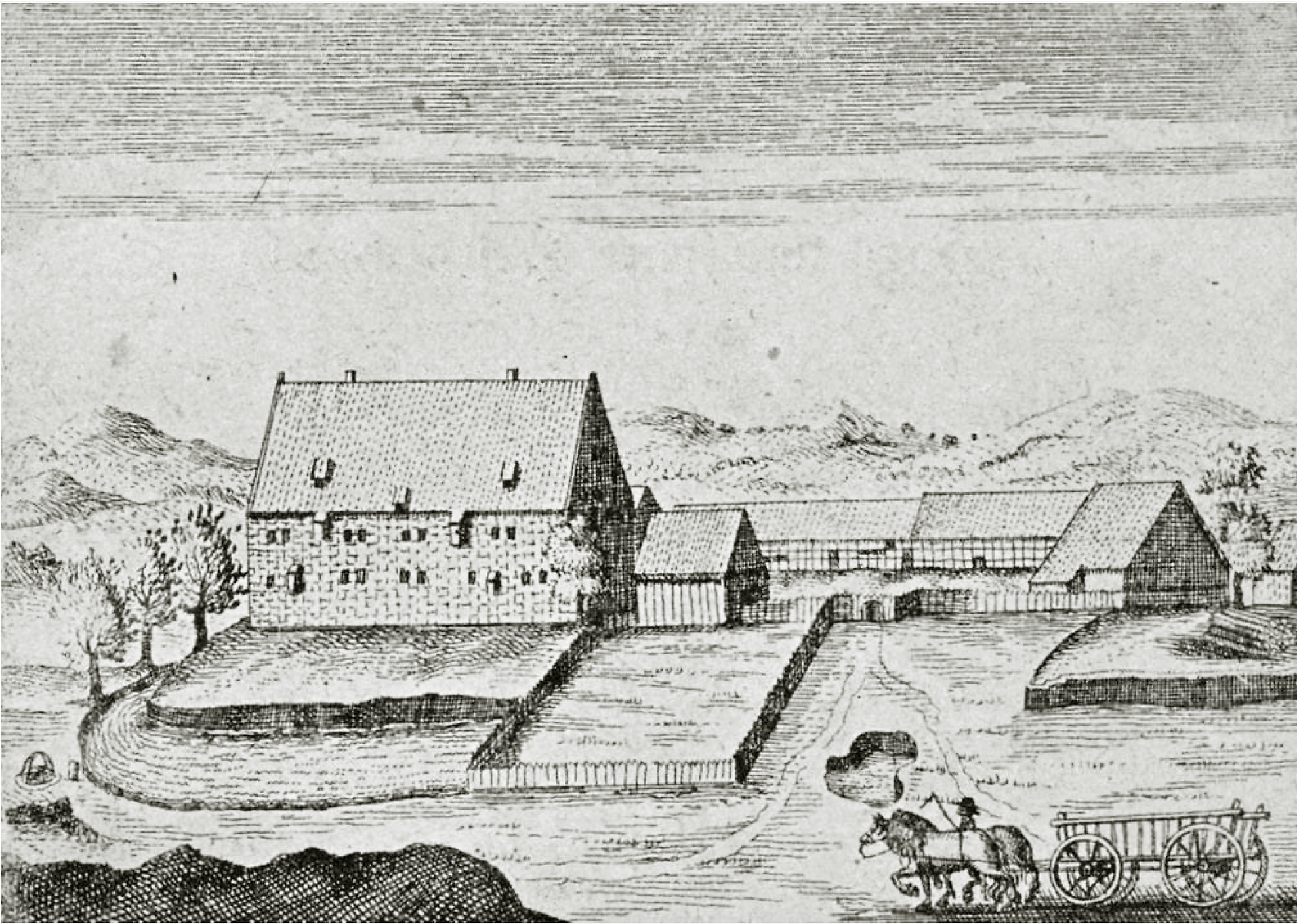 Haus Alverdissen, Kupferstich von Elias van Lennep um 1663